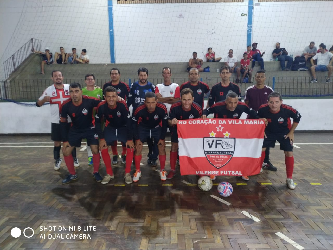 Equipe campeã da Copa Regional Sicoob Credicoop 2020 de Futsal em Pitangui.